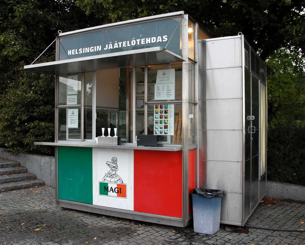 Helsingin jäätelötehtaan myyntikoju Helsingissä, Kaivopuiston rannassa.